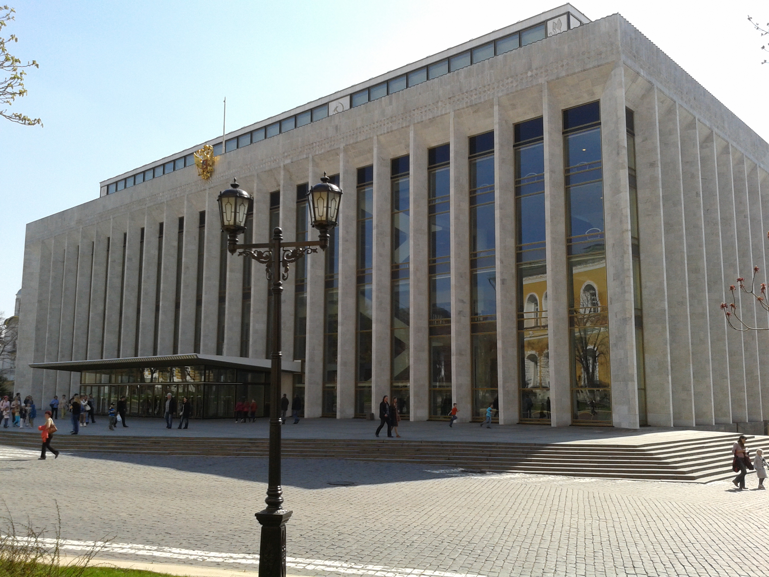 Московский Кремль. Государственный Кремлёвский дворец (вид со стороны здания Арсенала)